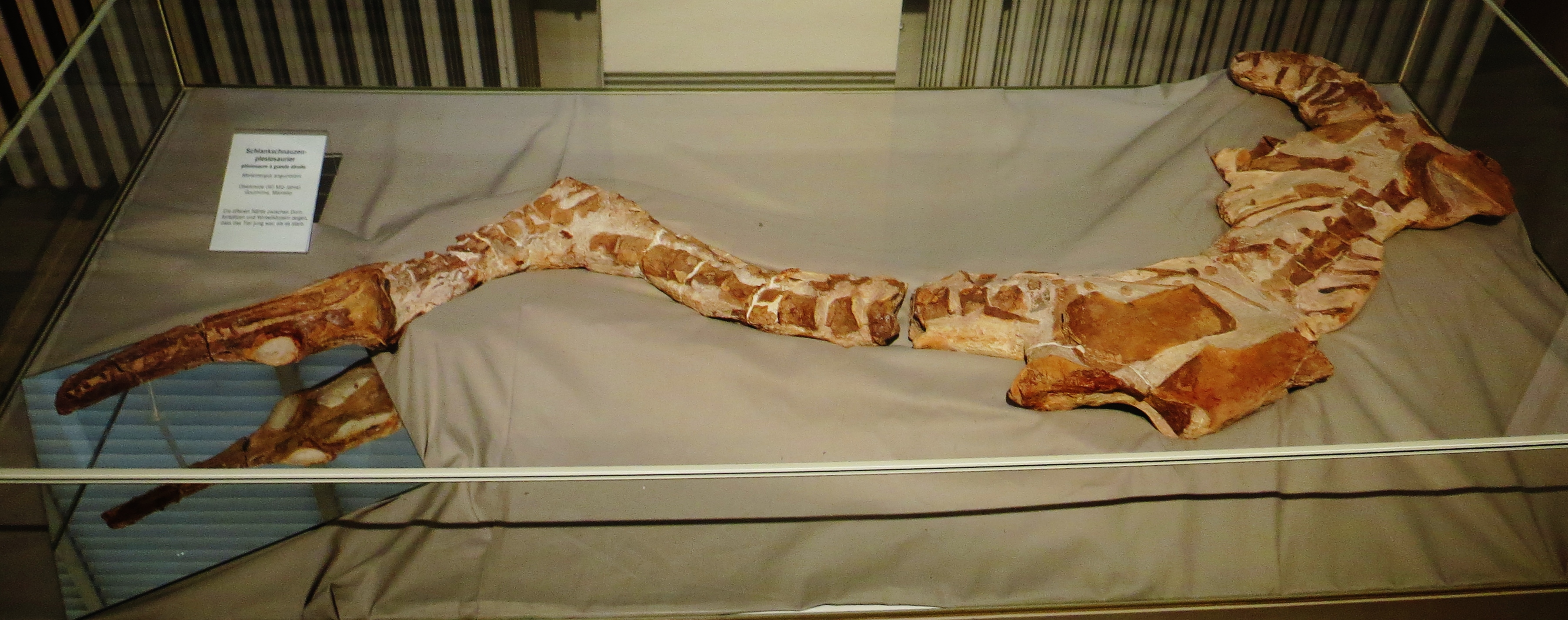 Fossil - Took the picture at Museum of Natural History, Karlsruhe